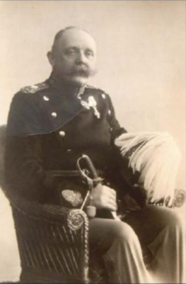 Louis Carl Frederik Lütken (1863-1918), Danish Major General. Photo in Rigsarkivet.